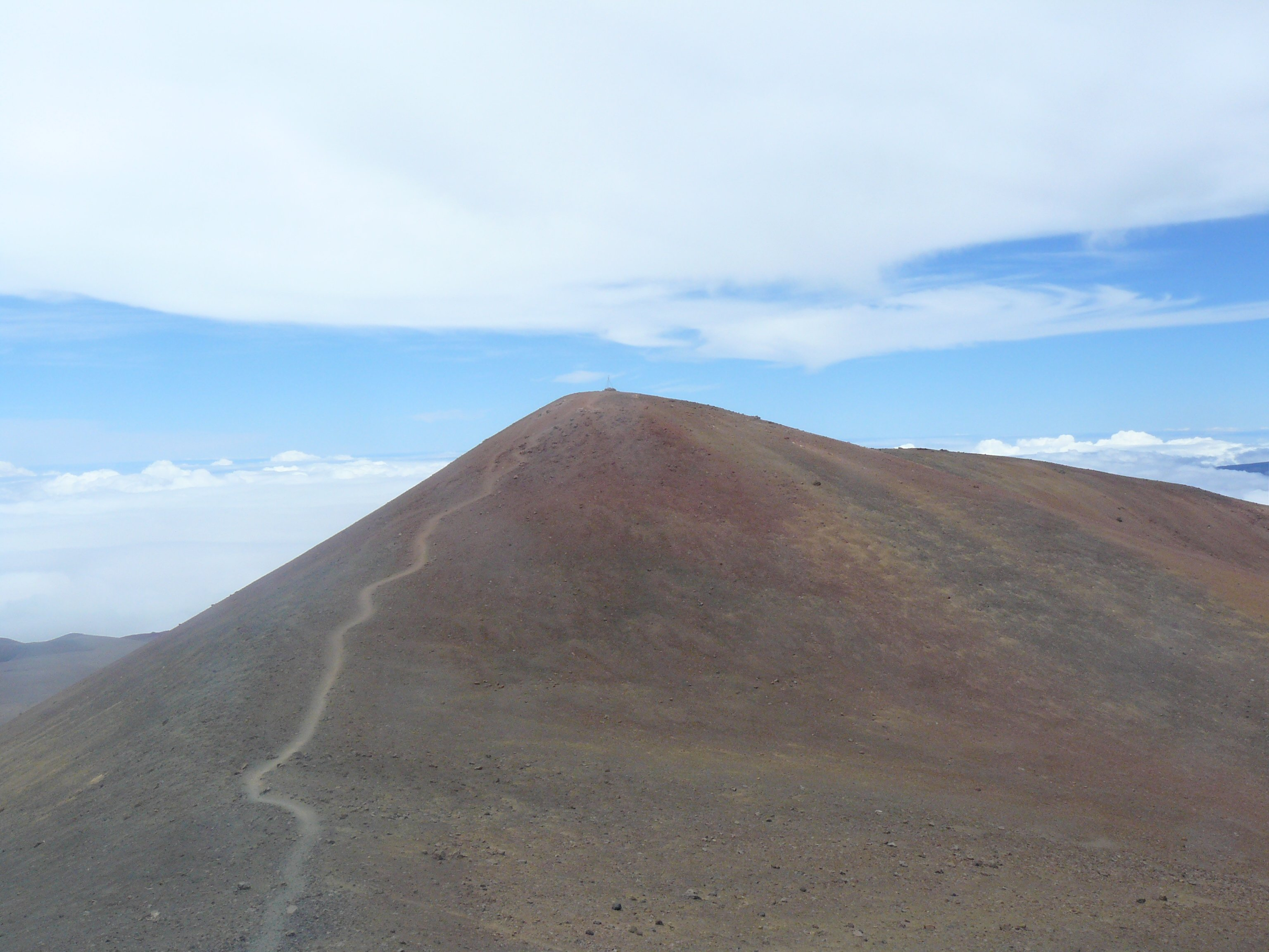 Sommet du Mauna Kea, surnommé Puʻu o Kūkahauʻula (4205 m)